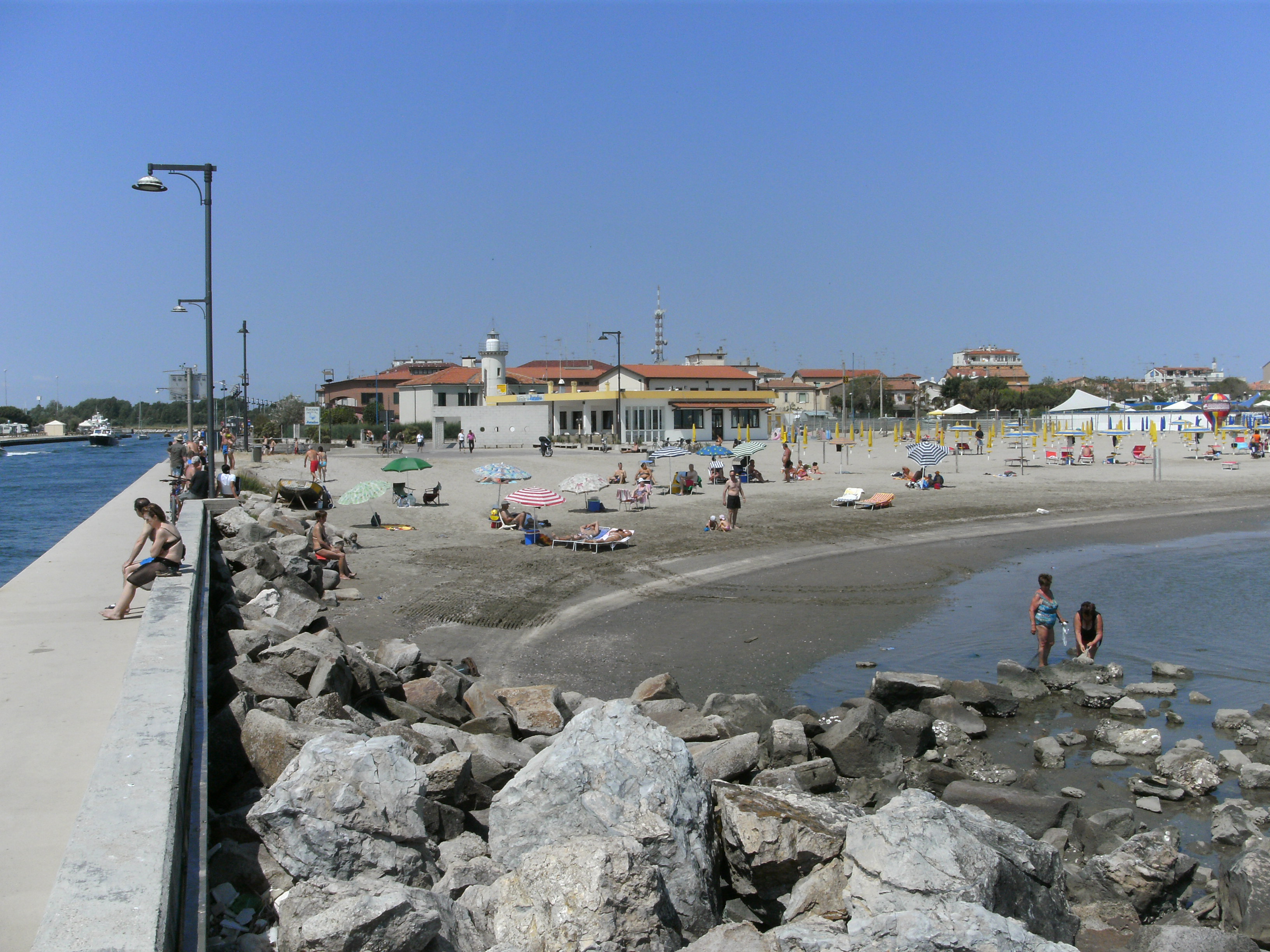 Porto Garibaldi (Comacchio, FE), Strandpartie von der Mole der Hafeneinfahrt aus gesehen